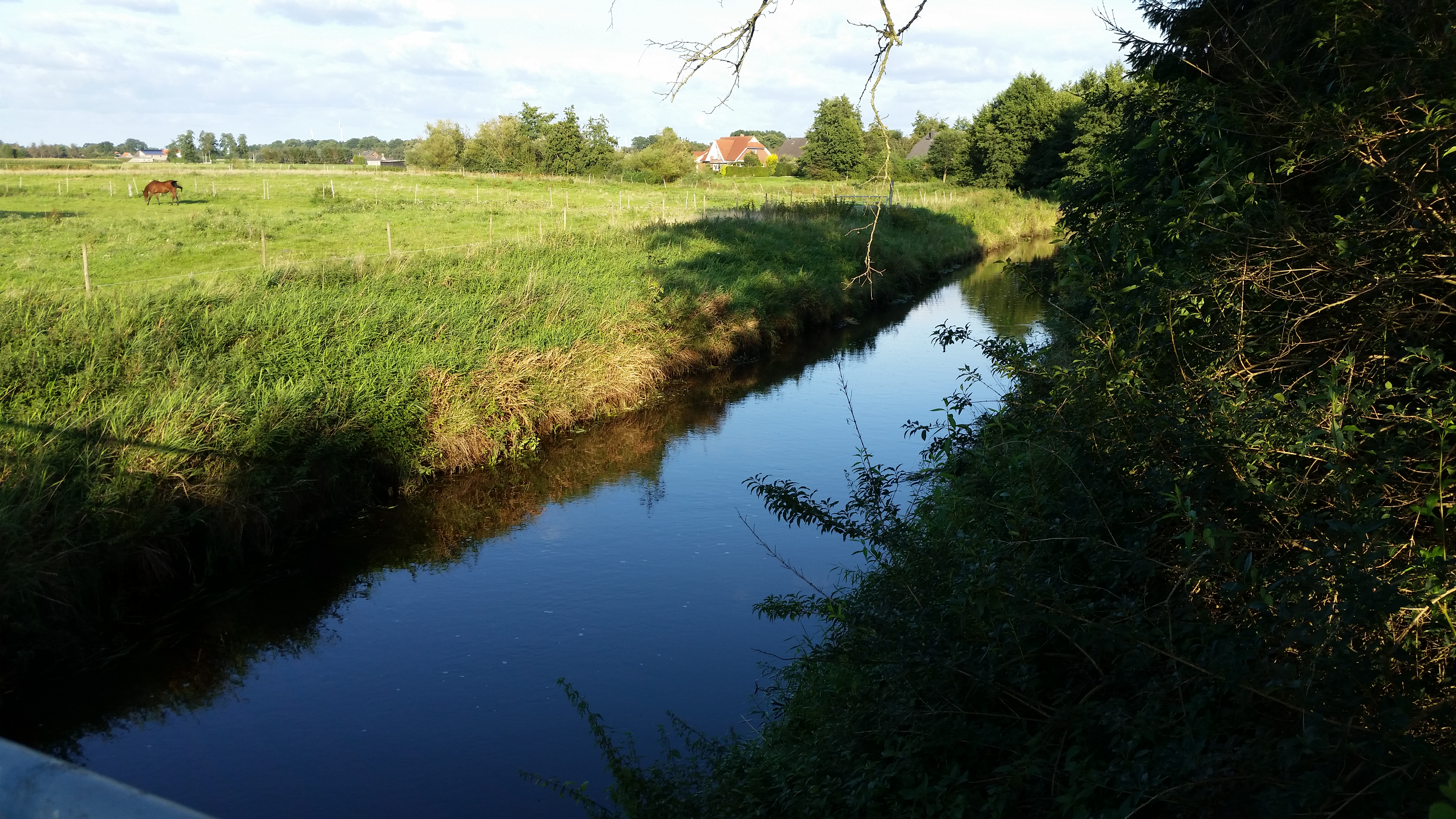 Die Wörpe in Grasberg (Hausstelle)